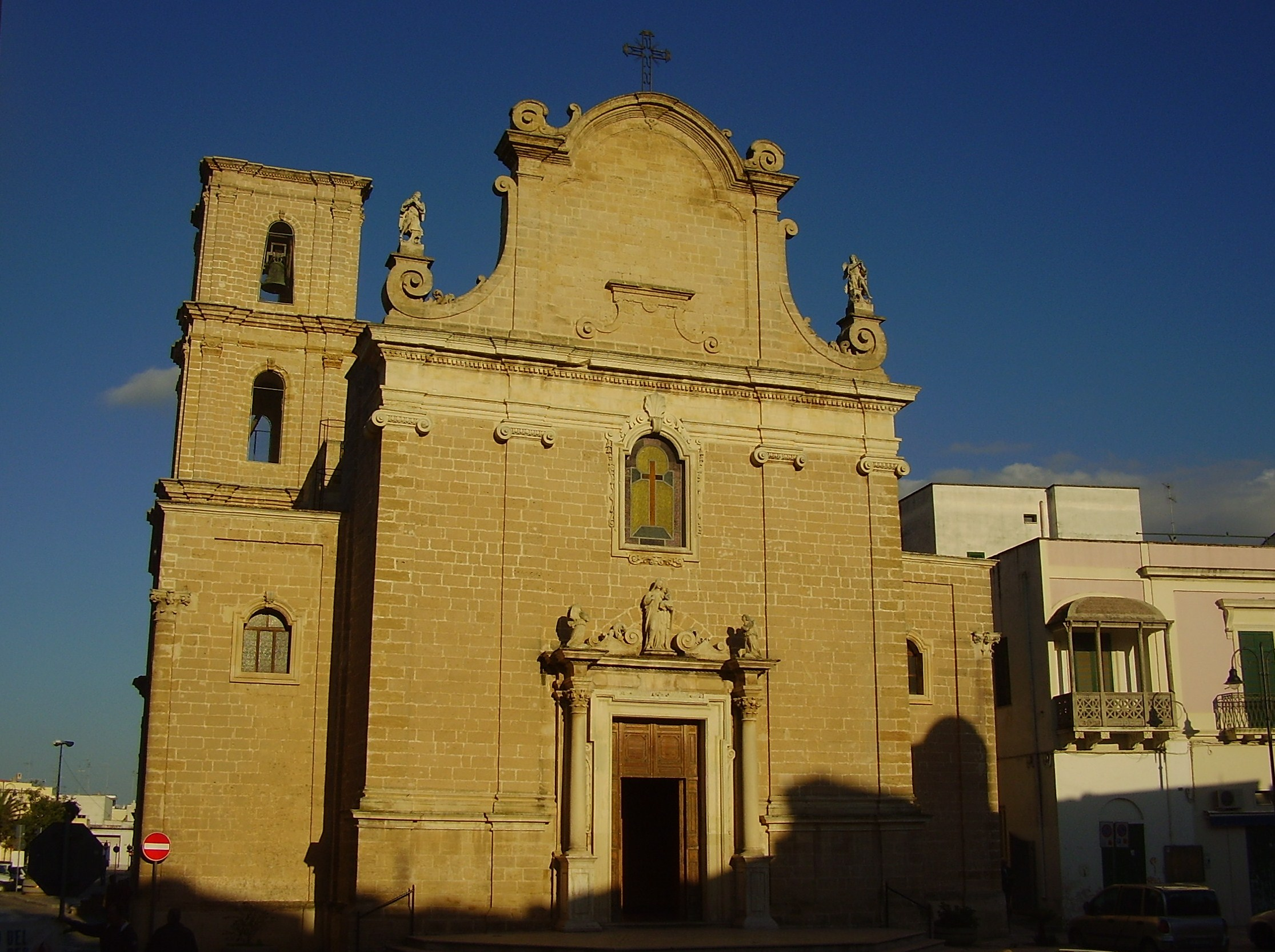 Chiesa Sant'Andrea Apostolo Novoli, Lecce